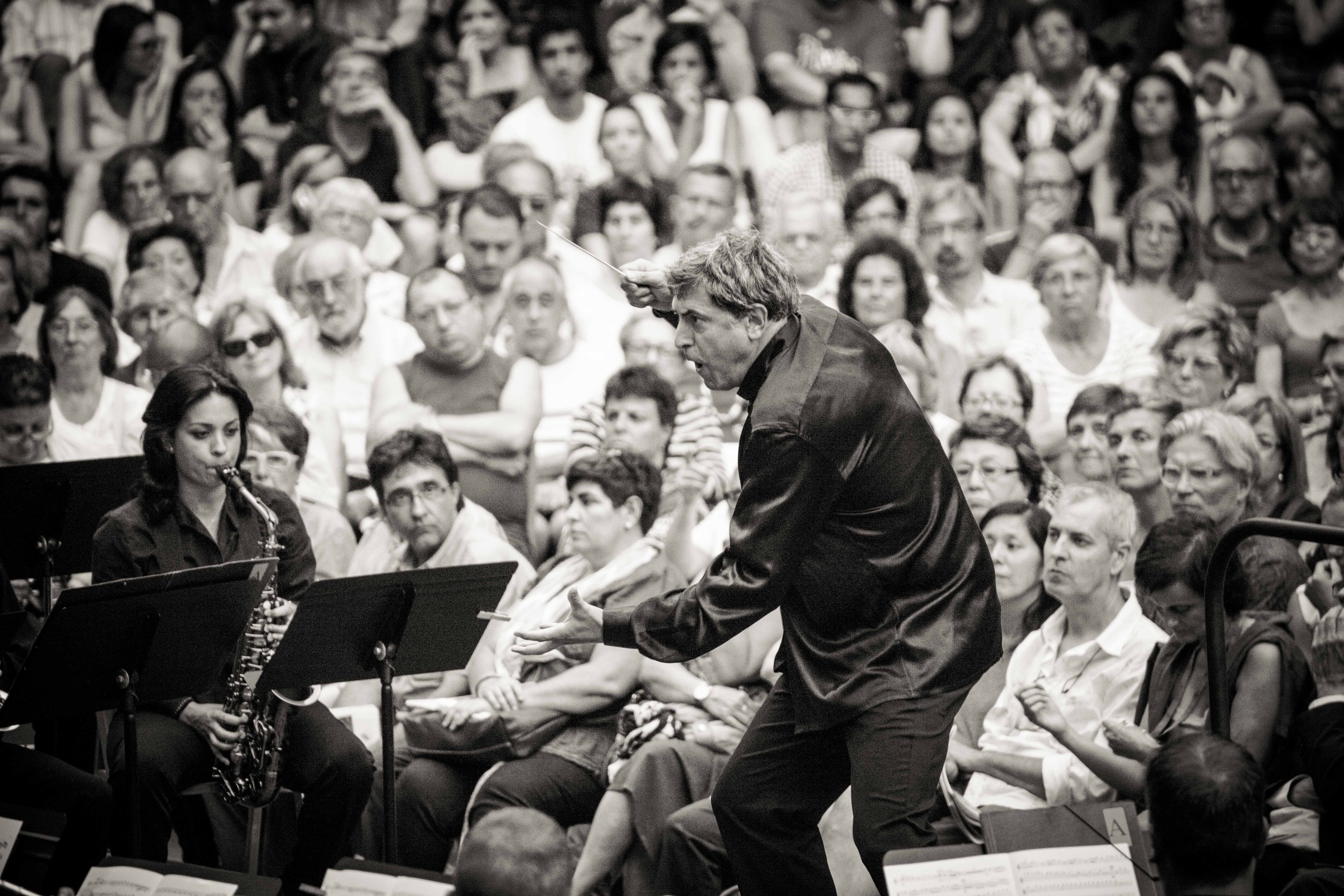 Concert a la Plaça del Rei, juliol de 2014